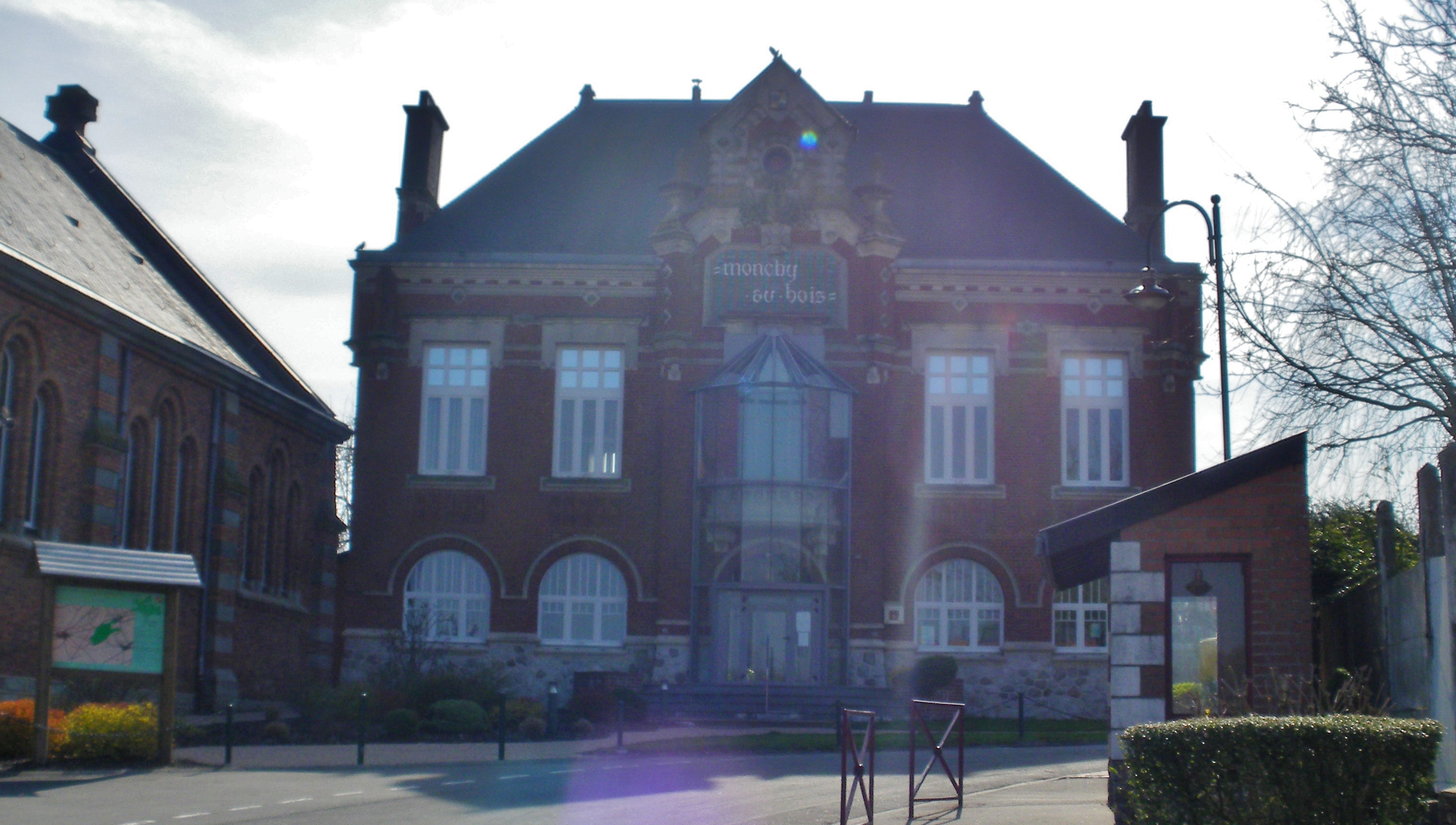 Vue de la mairie de Monchy-au-Bois.